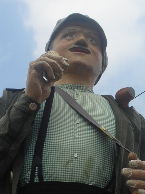 Oscar le voleur de pommes de terre le géant de Marquette-en-Ostrevant